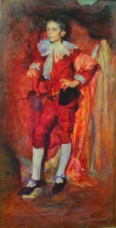 "Il paggio", olio su tela